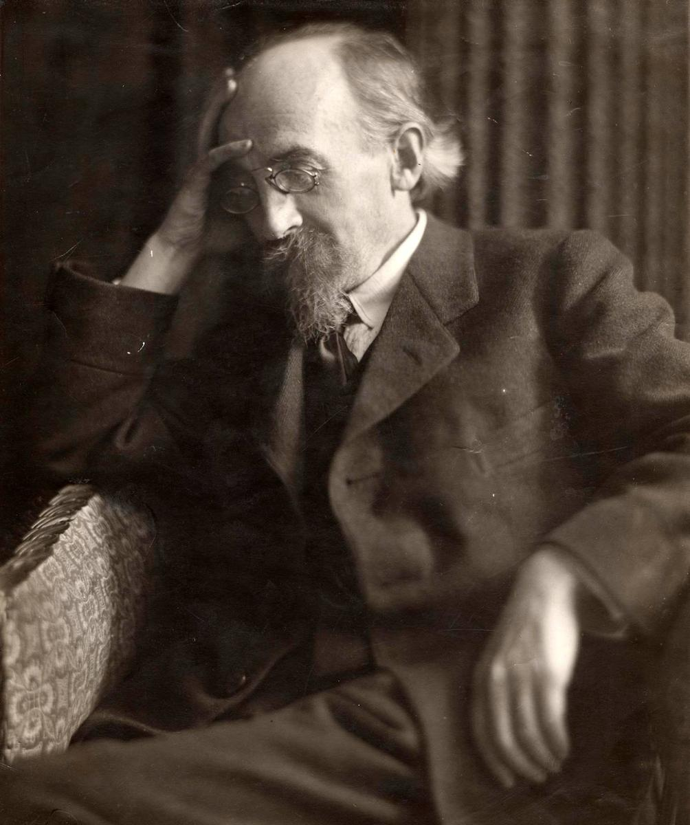 Kurt Eisner